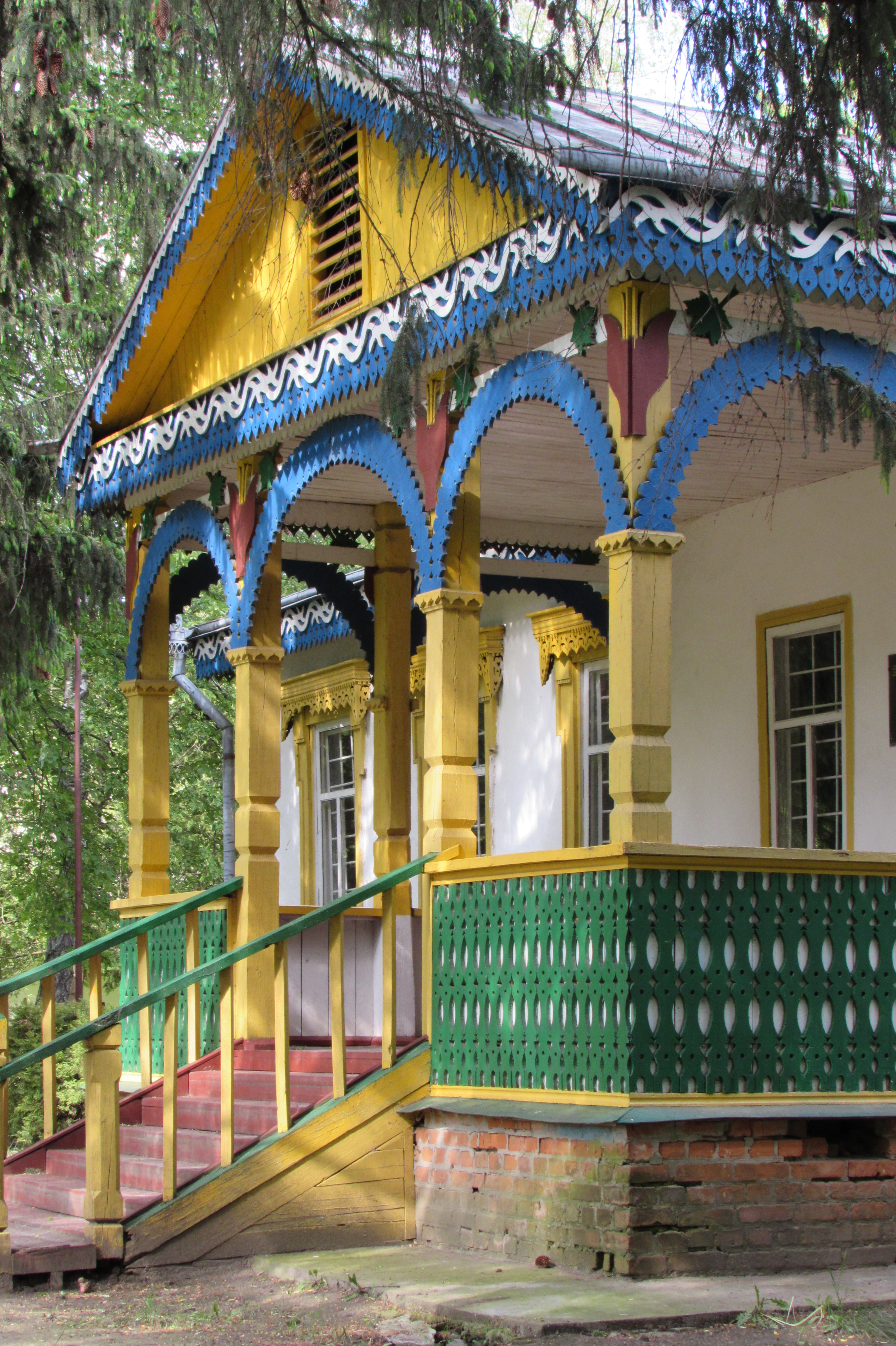 Будинок поміщика з с. Вороньків Бориспільського району Київської області, Переяслав-Хмельницький, вул. Літописна, 2, центральна частині музею